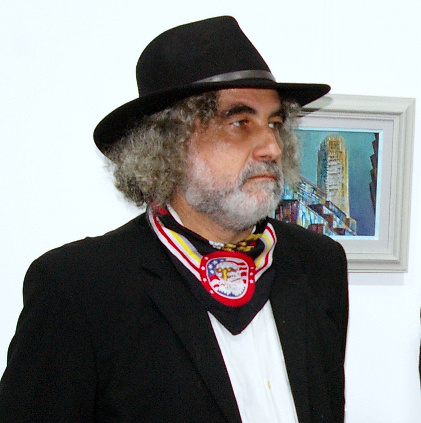 Снимката е правена в галерия Май - Сливен при откриването на самостоятелна изложба.